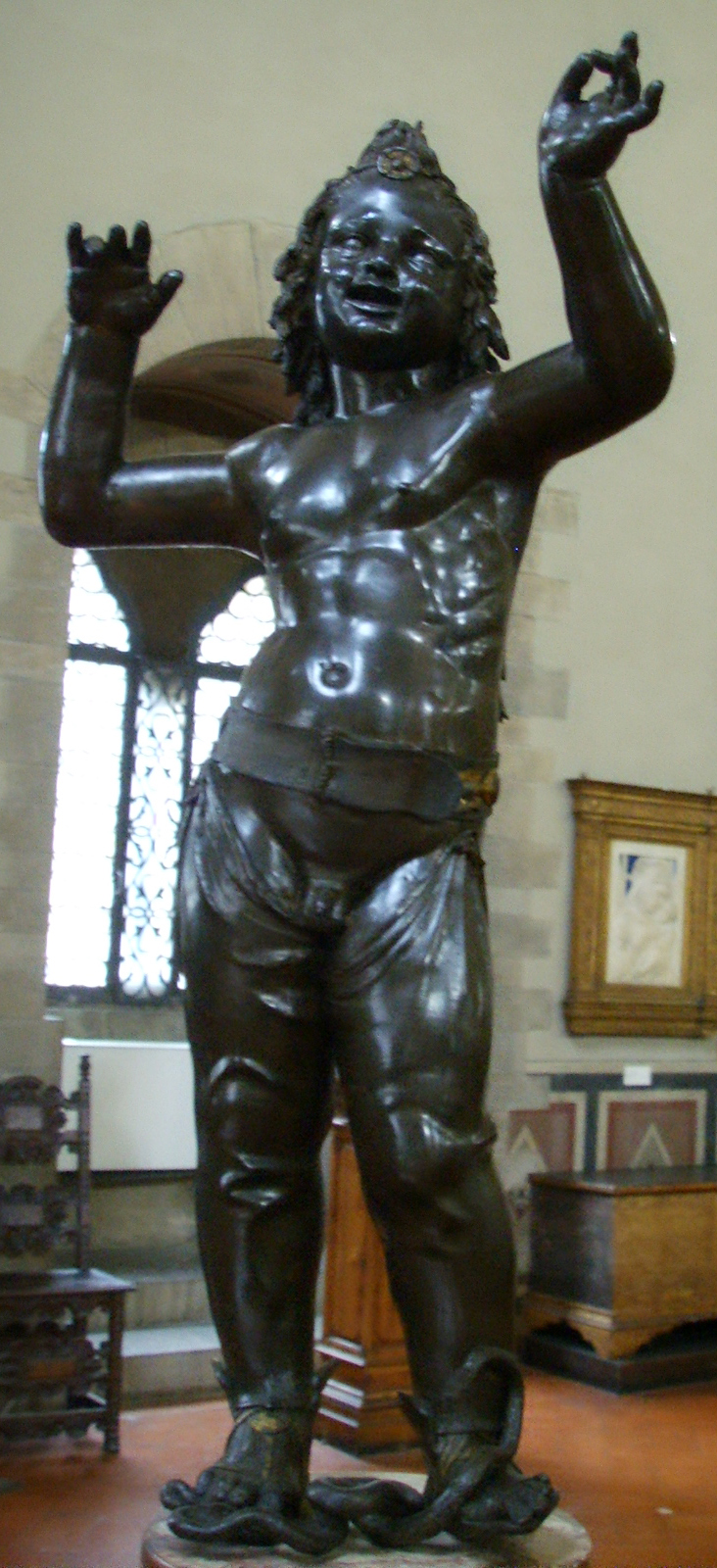 Donatello, amore-attys, 1440 circa